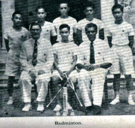 Kelab Badminton, 1954, Maxwell School